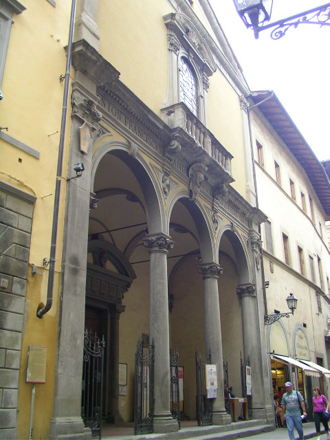 Santa Maria de' Ricci church facade in Florence, Italy